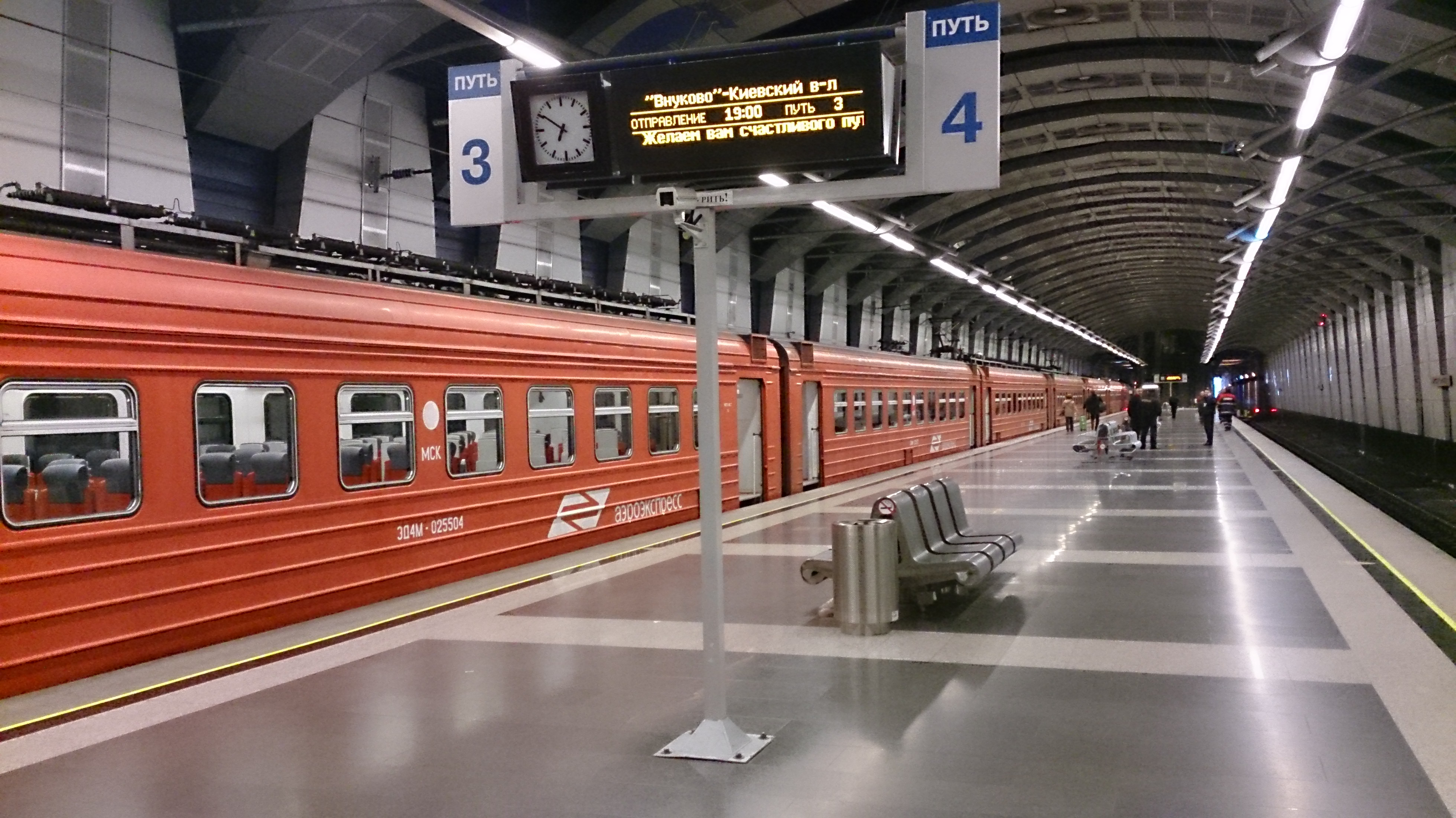 Подземная станция Аэроэкспресса во Внуково.